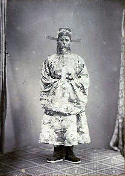 Án sát sứ tỉnh Quảng Nam Ngụy Khắc Đản